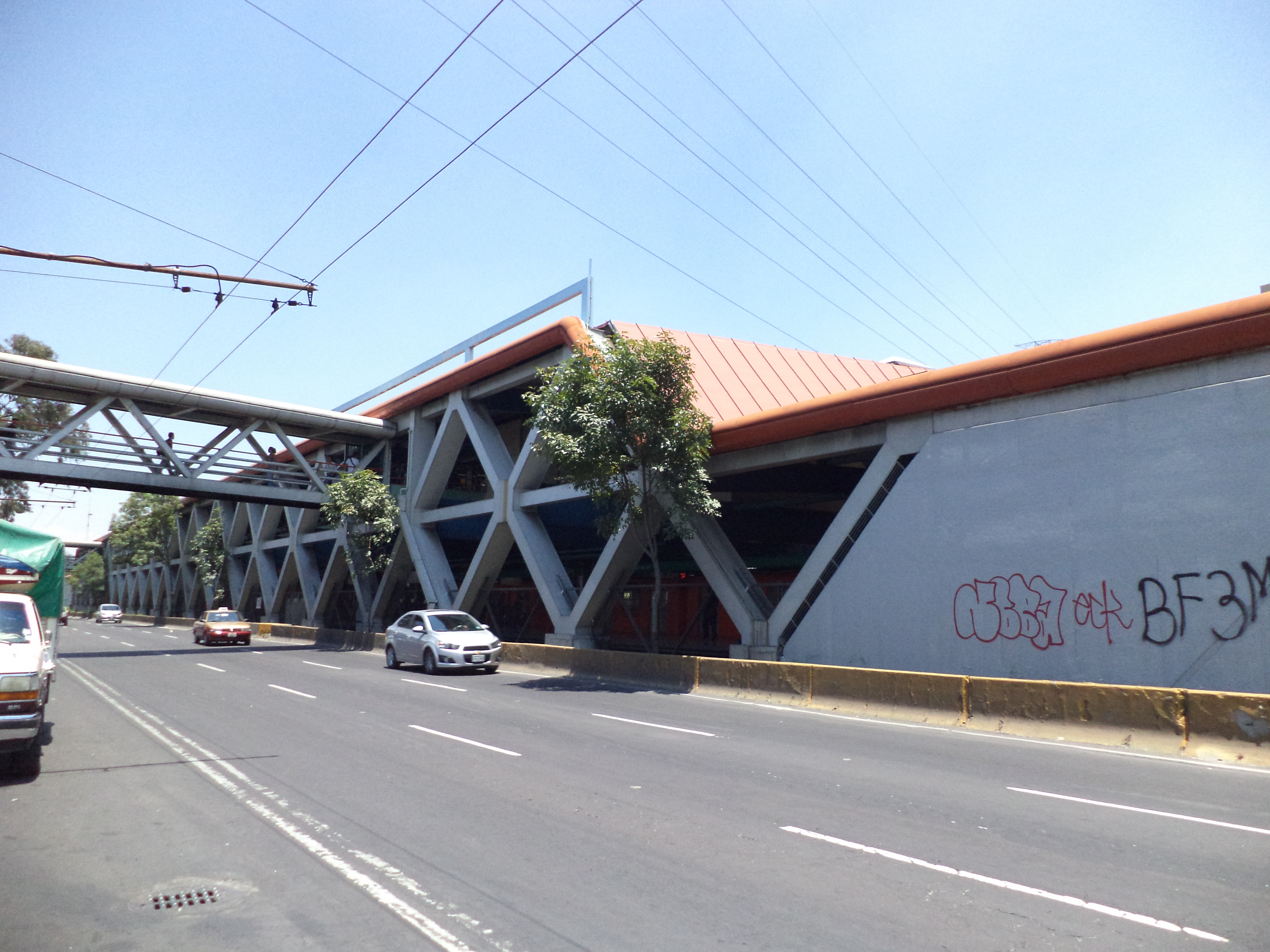 estacion constitucion 1917